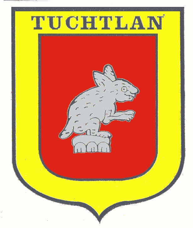 Yo hice esta imagen retocando otra y agregandoles los colores. Son diferentes y no se parecen.